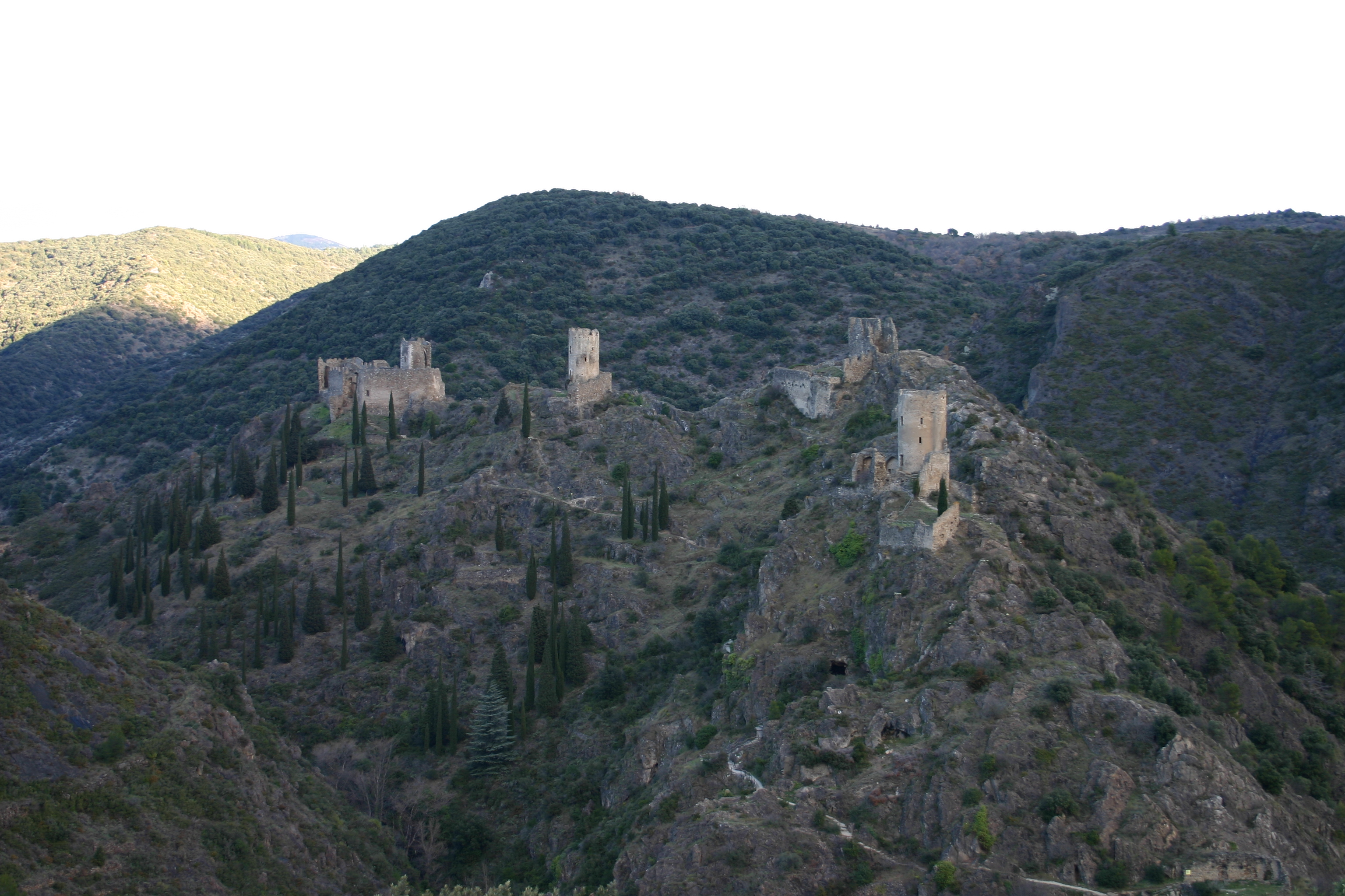 Eigen foto 12-2004 Heiko van Iddekinge